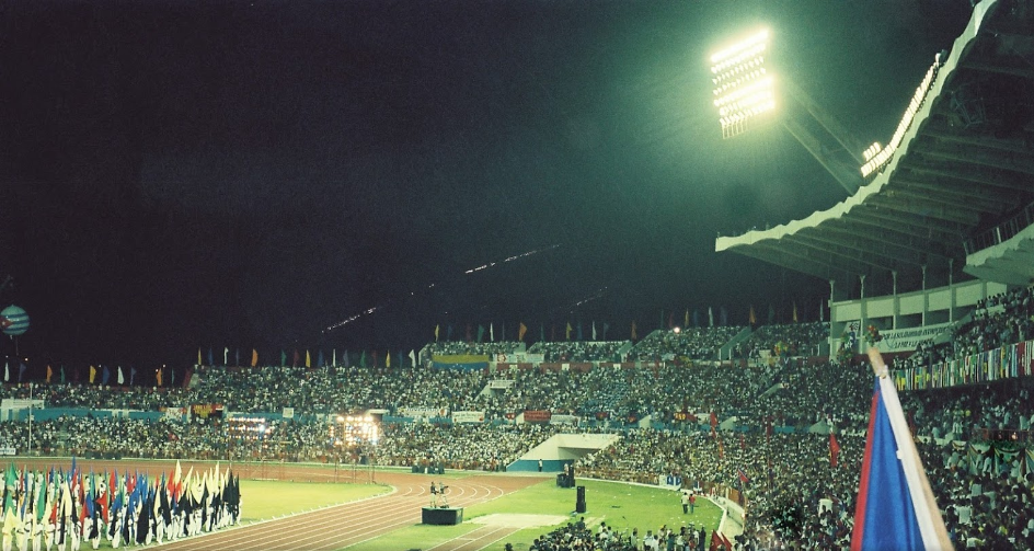 Interior del Estadio Panamericano de Cuba